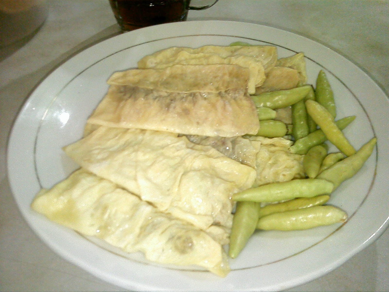 sosis solo basah